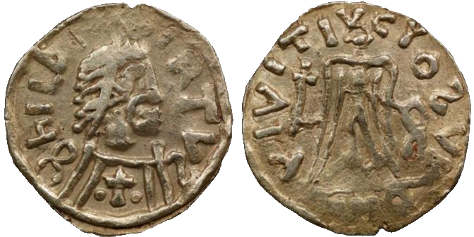 Tiers de sou de Childebert II. BNF, monnaies, médailles et antiques. Avers : Buste diadémé à droite, une croix sur la poitrine. Revers : Victoire debout de face, tenant une croix et une couronne.